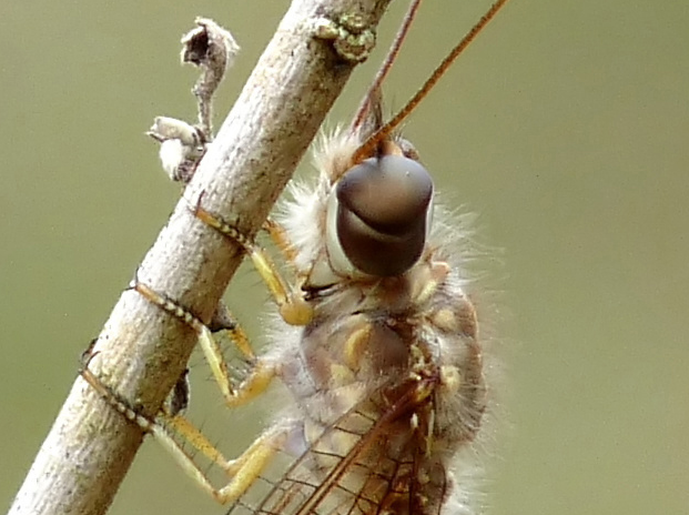 Cutted version of Ascalaphidae female at Kadavoor.jpg